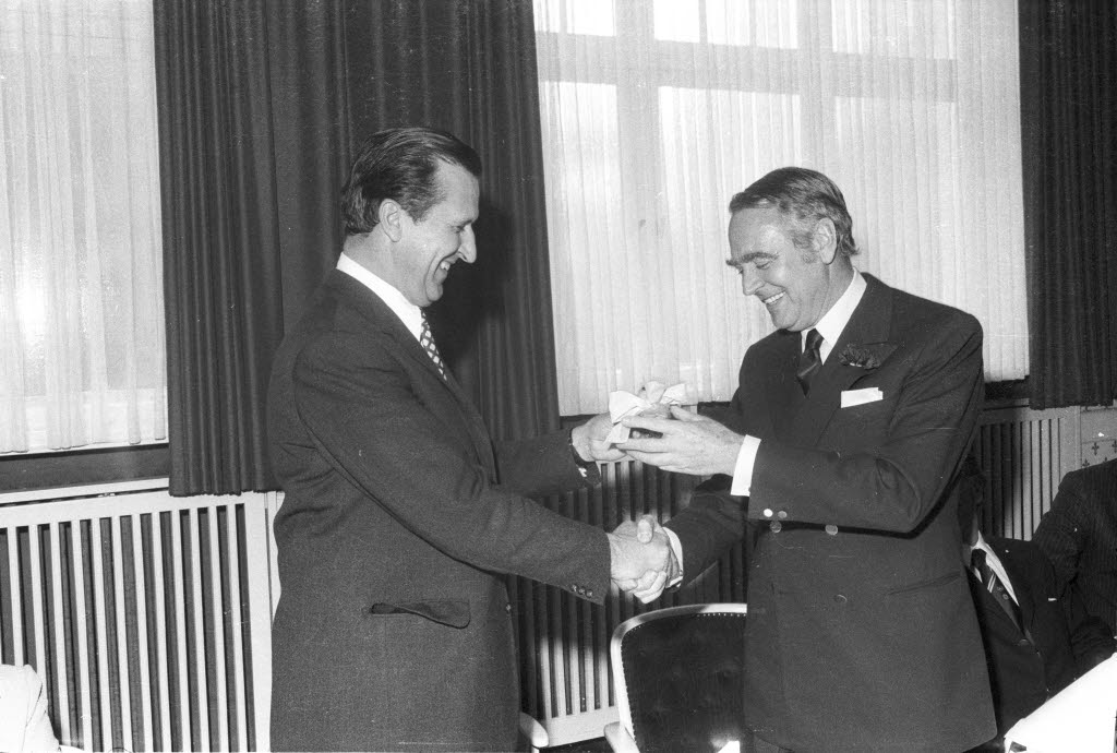 Oberbürgermeister Günther Bantzer übergibt symbolisch das Olympiazentrum in die Verantwortung des Organisationskomitees für die XX. Olympischen Spiele, vertreten durch den Vorsitzenden des Segelausschusses, Berthold Beitz.